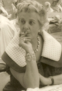 Porträt von Hansi Bochow-Blüthgen